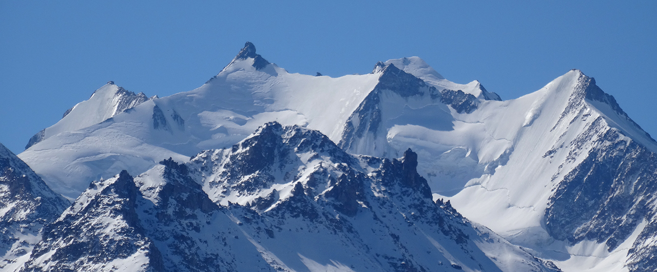 Mischabelgruppe mit den 4000er Dom, Nadelhorn, Lenzspitze, Stecknadelhorn und Hobärghorn (Aufnahmestandort Moosalp)